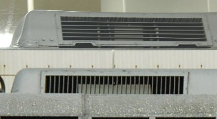 桟の方向が海側と山側で違う事を示す